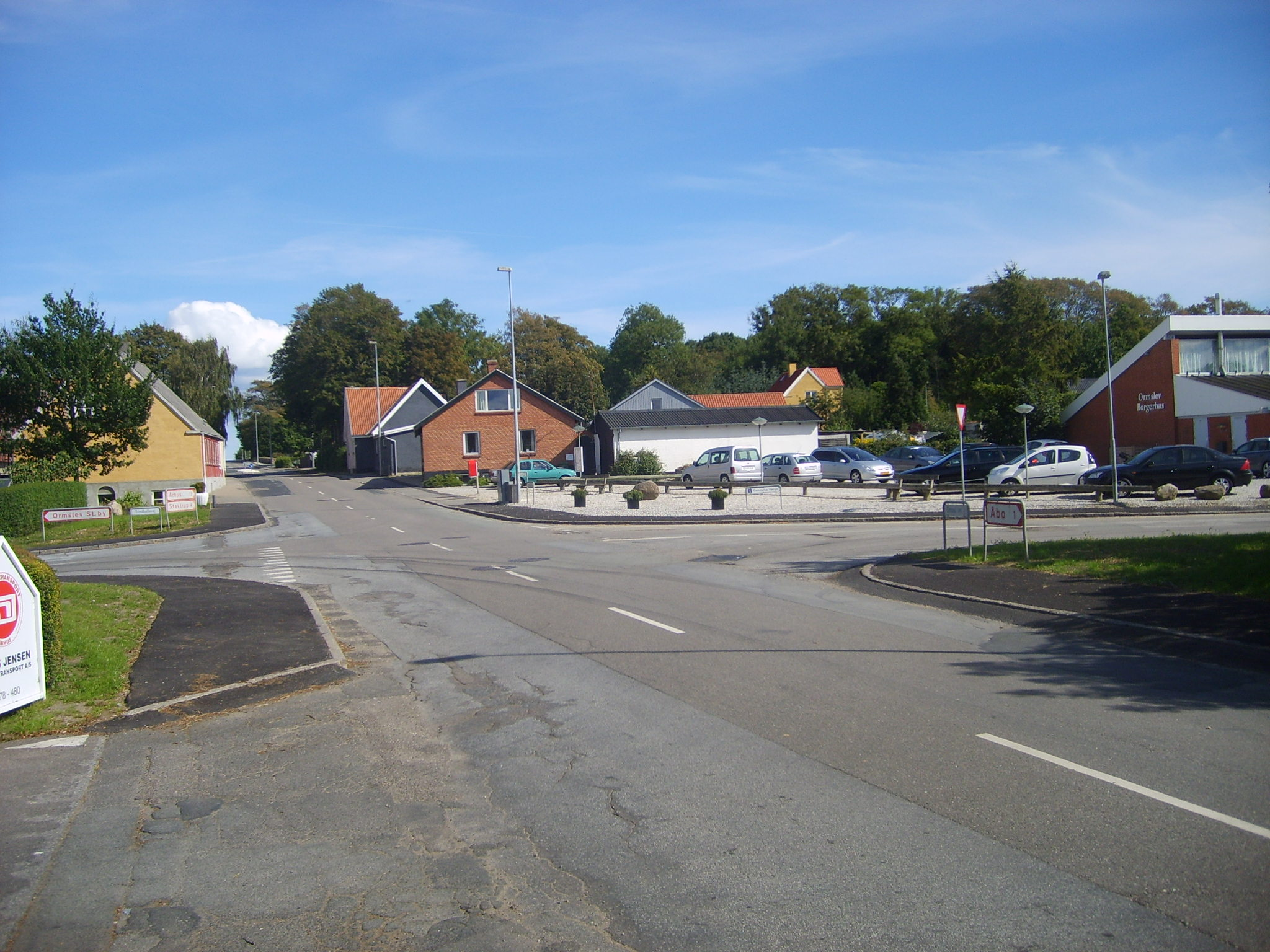 Center of Ormslev in Denmark